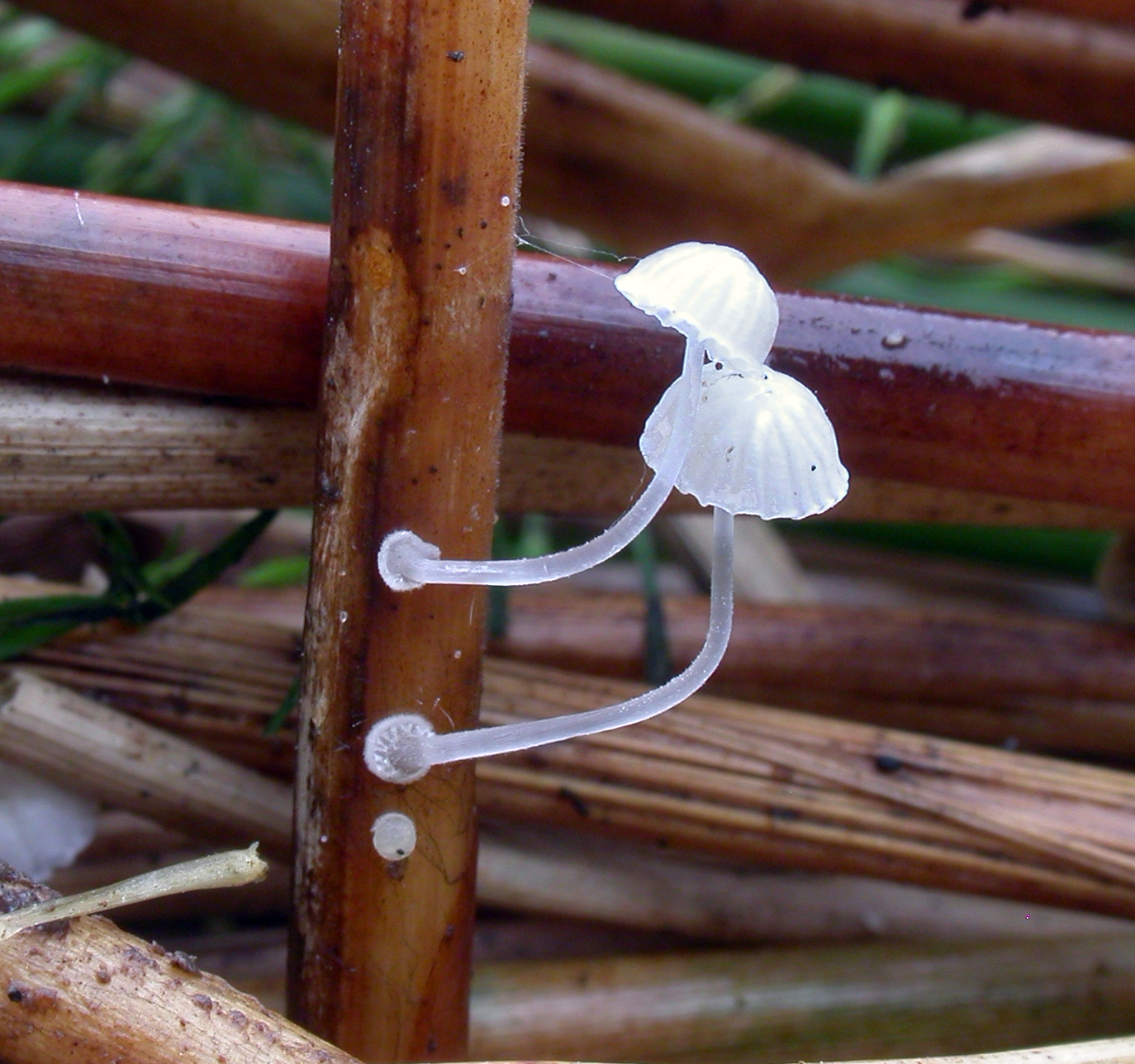 Sopparten sivsokkelhette (Mycena bulbosa).